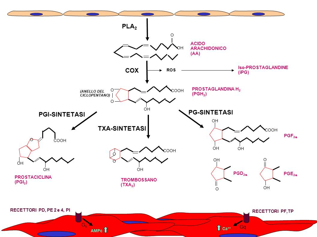 Metabolismo dell'acido arachidonico nella via della ciclossigenasi.